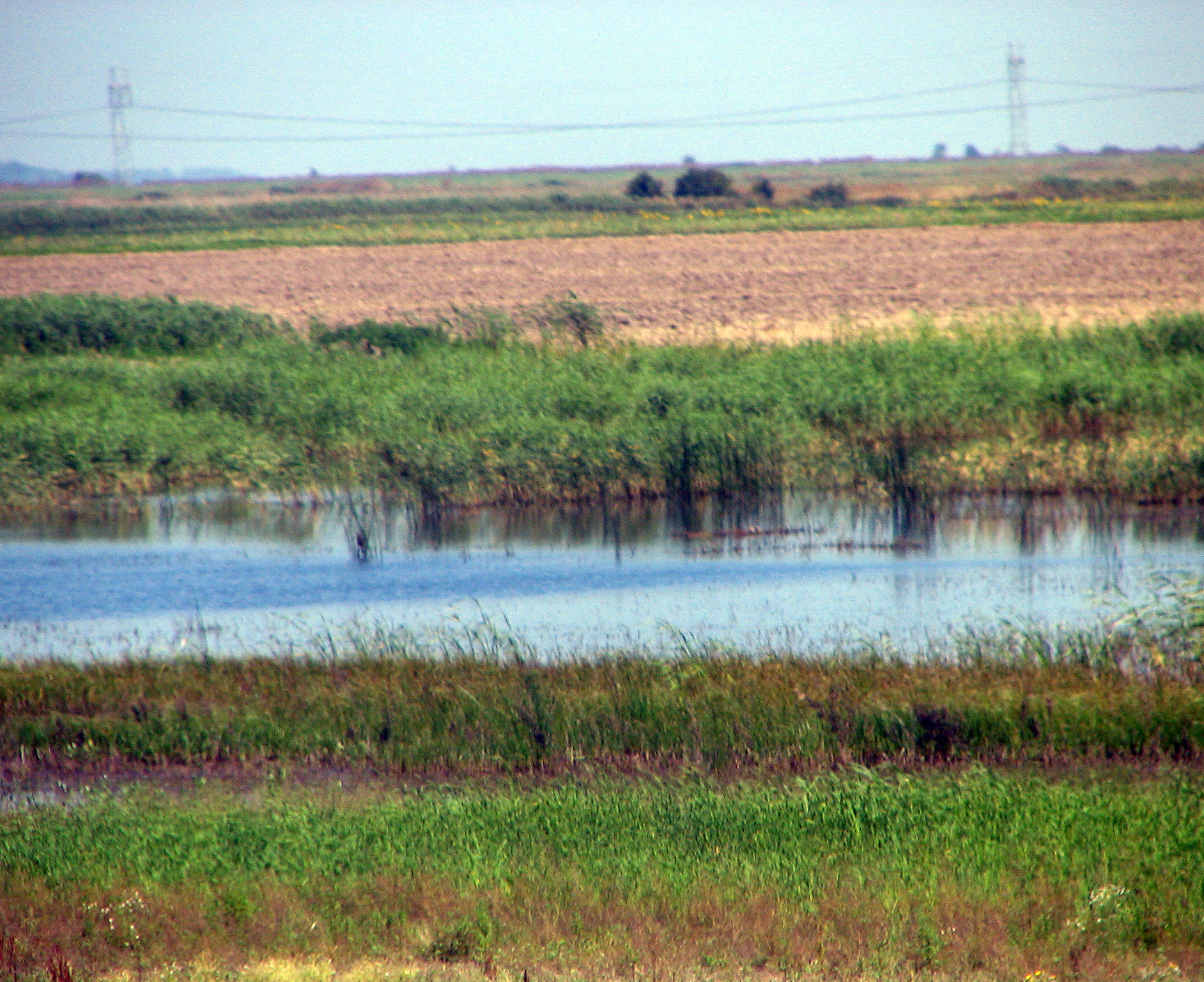 Balta Ialomiţei, România